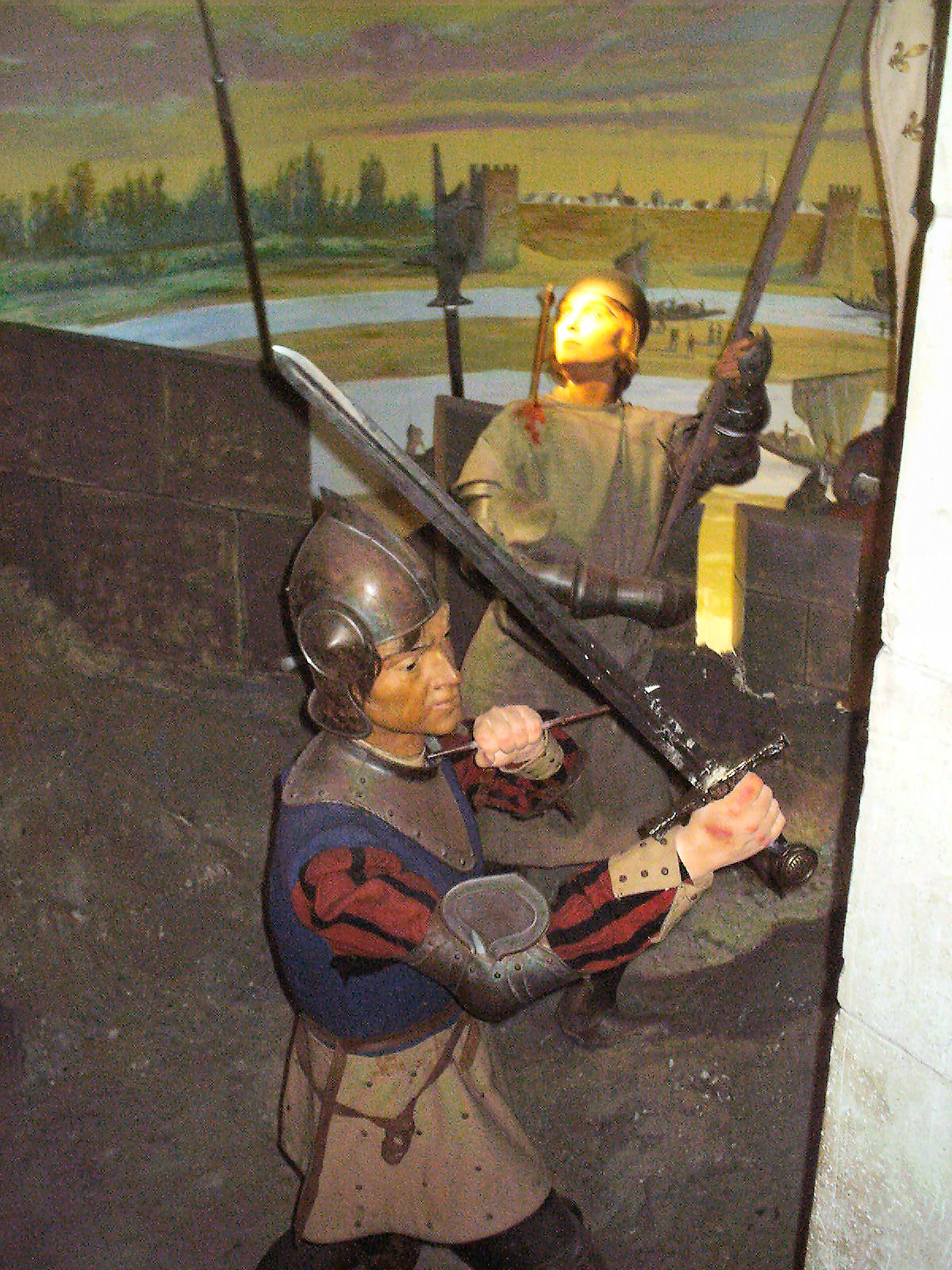 Scène de la prise d'Orléans du Musée Jeanne d'Arc de Rouen. Avec l'aimable autorisation du Musée Jeanne d'Arc de Rouen.